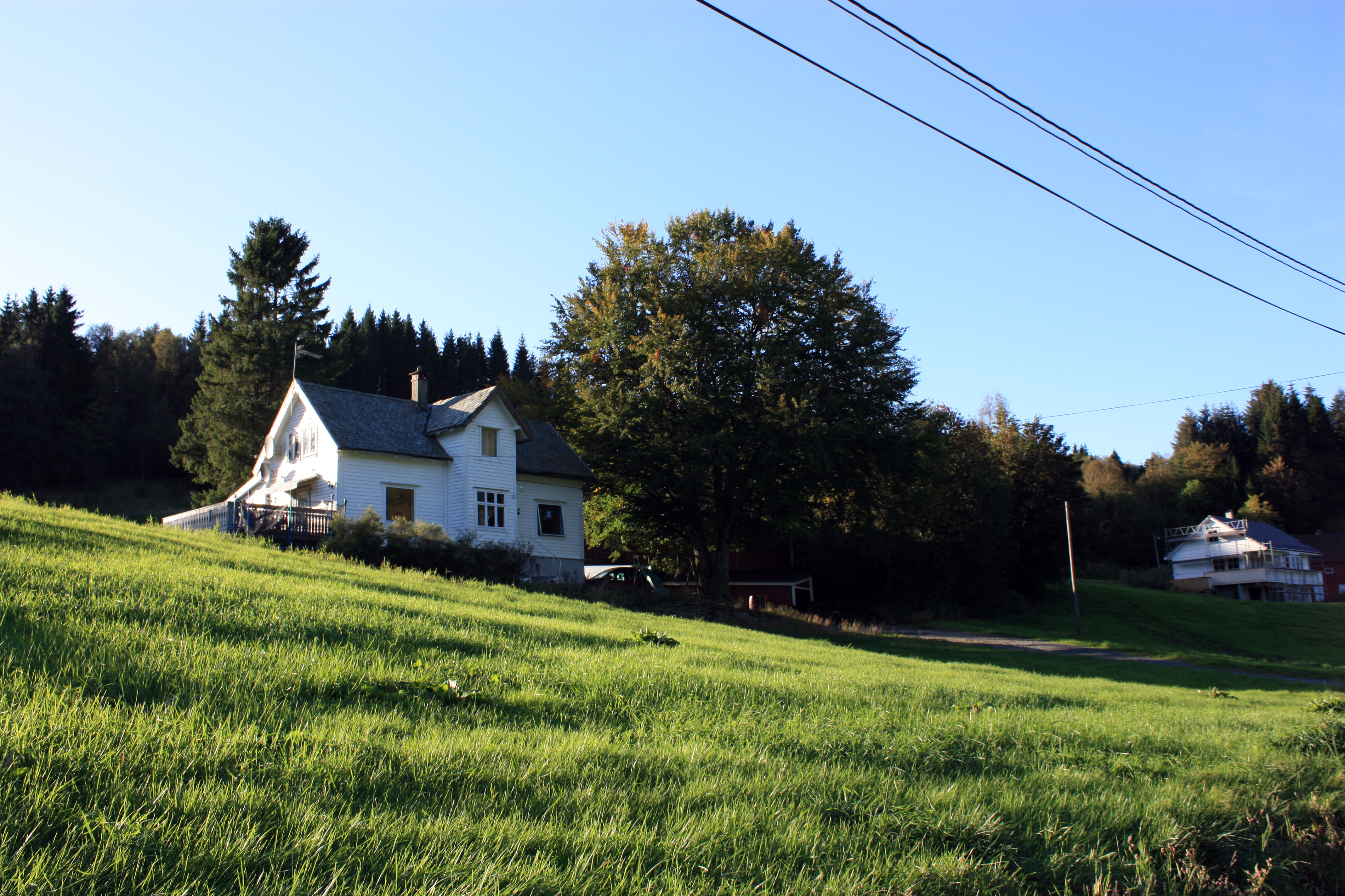 Øvre Dyngeland, Fana, Bergen.